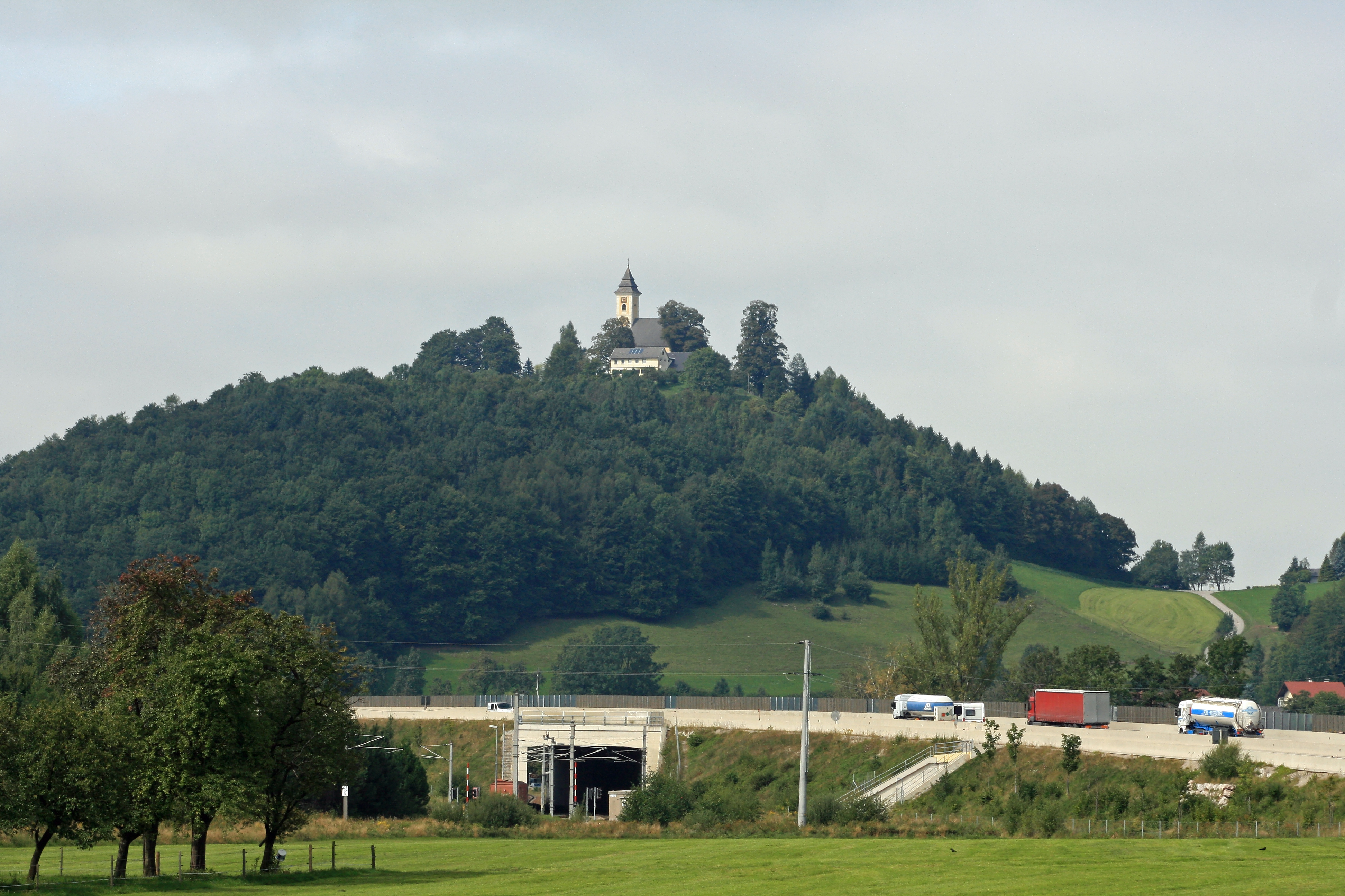 Blick auf den Georgenberg in Micheldorf / Oberösterreich mit der Georgenbergkirche. Im Vordergrund sind die Trasse der Pyhrnautobahn (A 9) und eine Unterführung der Pyhrn-Eisenbahn zu sehen